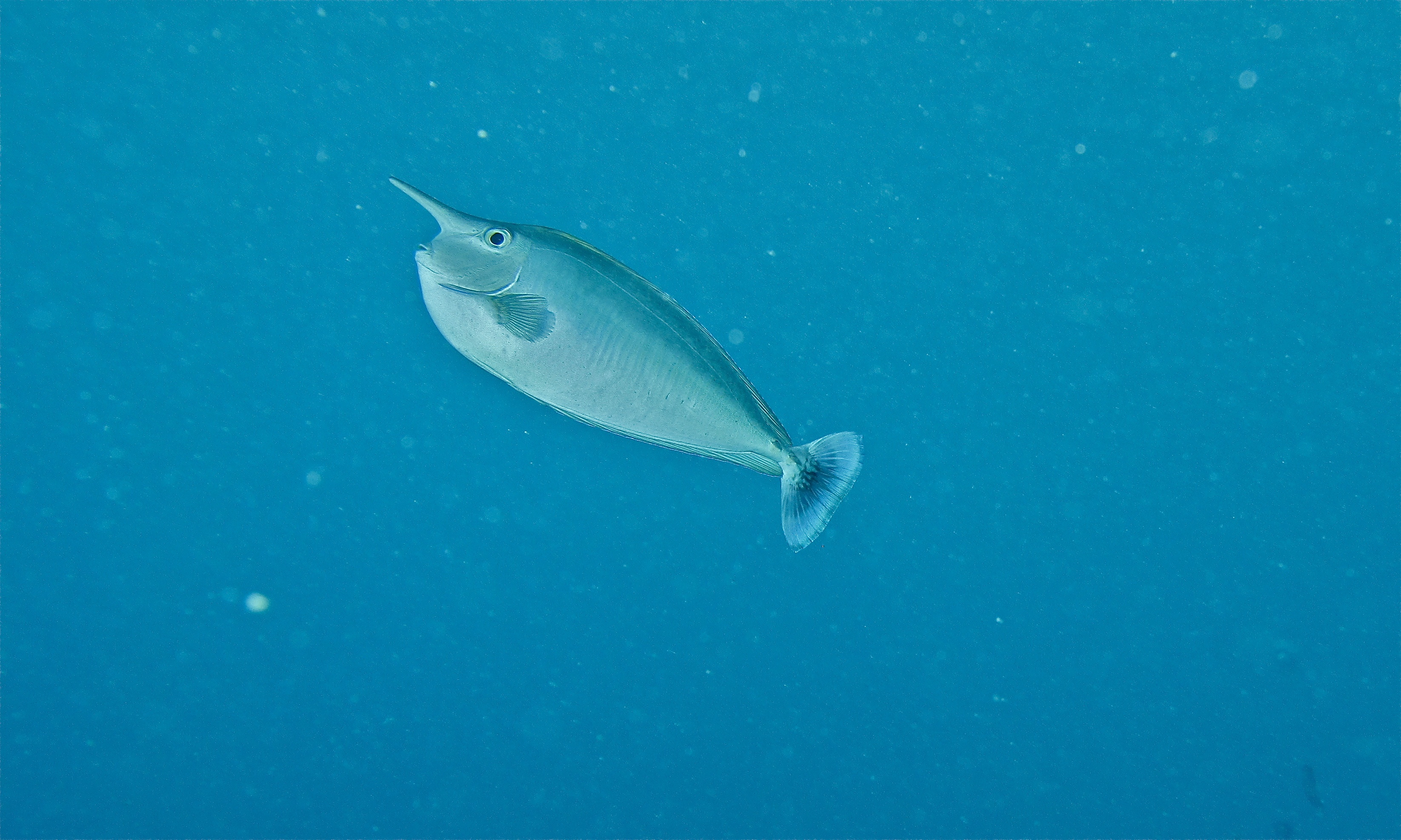 South Point, Pulau Sipadan, Sabah, MALAYSIA